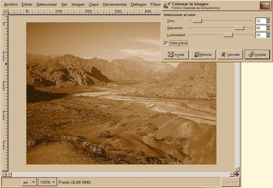 Ejemplo de coloreado en Gimp.